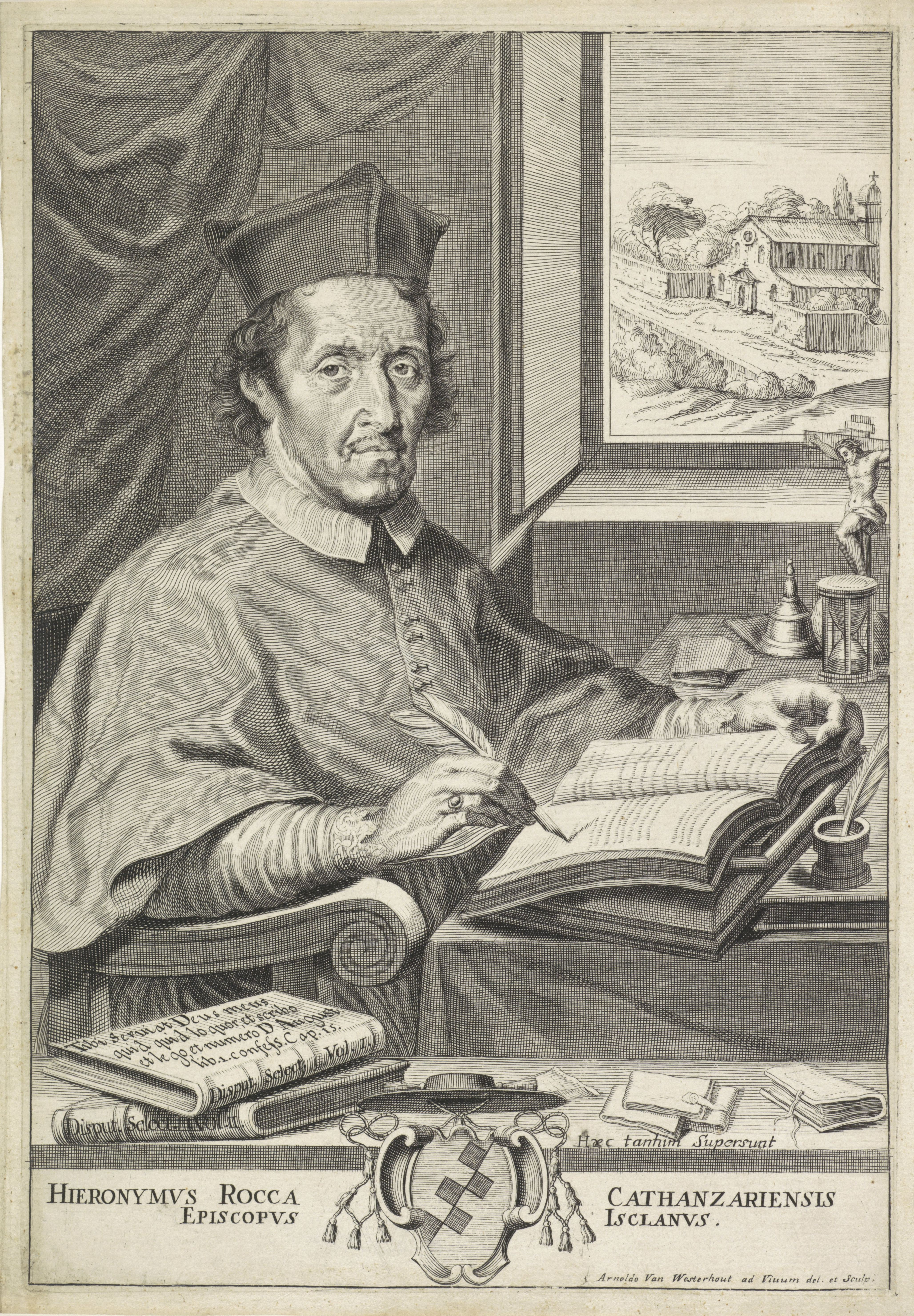 IdentificatieTitel(s): Portret van Hieronymus RoccaObjecttype: prent Objectnummer: RP-P-1909-4582Opschriften / Merken: verzamelaarsmerk, verso, gestempeld: Lugt 2228Omschrijving: Portret van Hieronymus Rocca, bisschop van Ischia. Hij zit in zijn studeervertrek aan een schrijftafel. Op de tafel een zandloper, crucifix, bel en een schrijfveer. Op de voorgrond boeken en notitieboekjes. Op de achtergrond door het venster een gezicht op een kerk. In de marge zijn naam en wapenschild.VervaardigingVervaardiger: prentmaker: Arnold van Westerhout (vermeld op object)naar tekening van: Arnold van Westerhout (vermeld op object)Plaats vervaardiging: ItaliëDatering: 1665 - 1725Fysieke kenmerken: gravure en etsMateriaal: papier Techniek: graveren (drukprocedé) / etsenAfmetingen: plaatrand: h 271 mm × b 188 mmOnderwerpWat: armorial bearing, heraldrychurch (exterior)hourglasscrucifix ~ personal devotionWie: Hieronymus RoccaVerwerving en rechtenVerwerving: aankoop 1905Copyright: Publiek domein